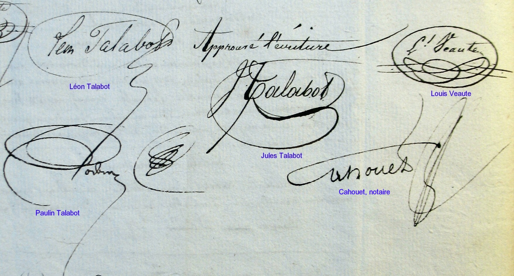 Archives nationales Paris Minutier central des notaires parisiens Cote MC/ET/XLVIII/687 Etude de Me Augustin Barthélemy CAHOUET Statuts de la Compagnie des mines de la Grand'Combe et des chemins de fer du Gard 10 mai 1836